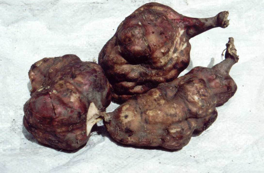 Fruto oriundo usado en la medicina alternativa, combate la diabetes y calma la sed; se come crudo.